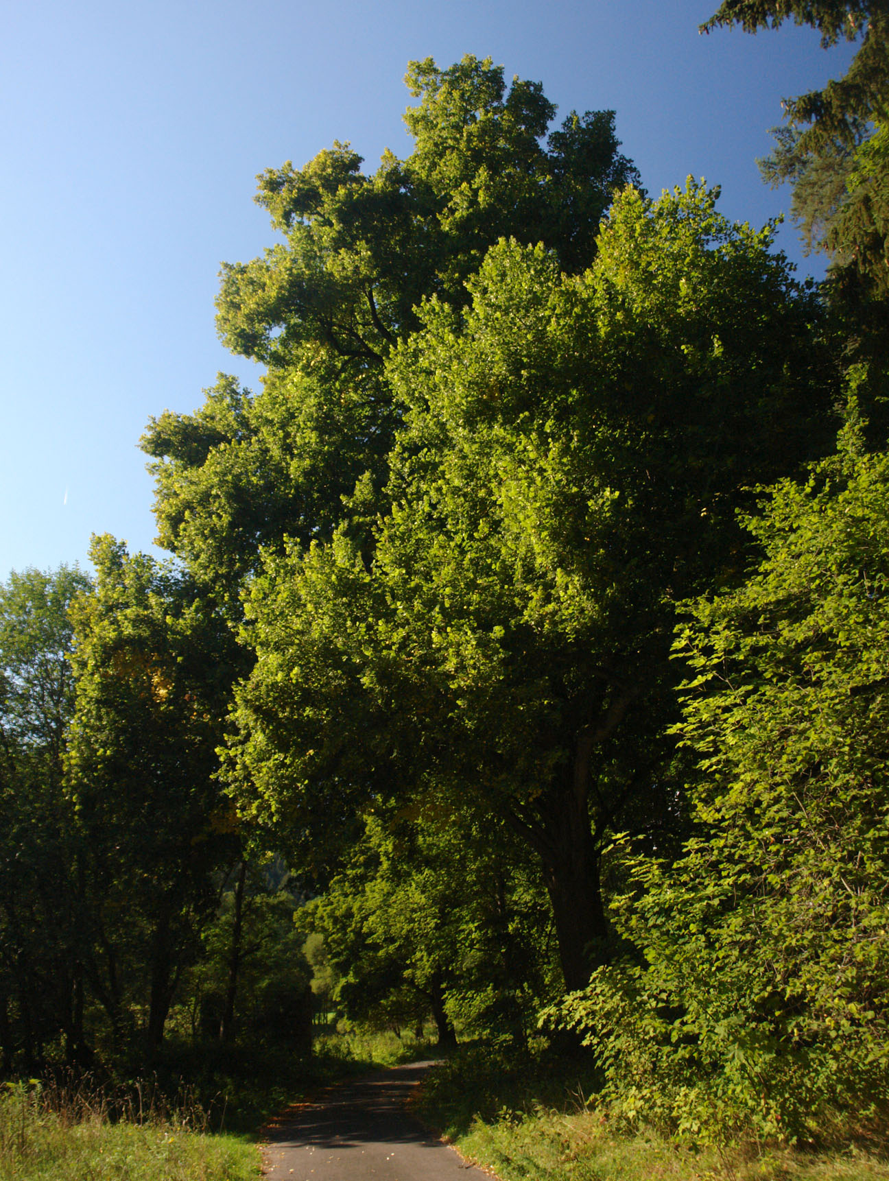 Památná Boněnovská lípa u Plané.